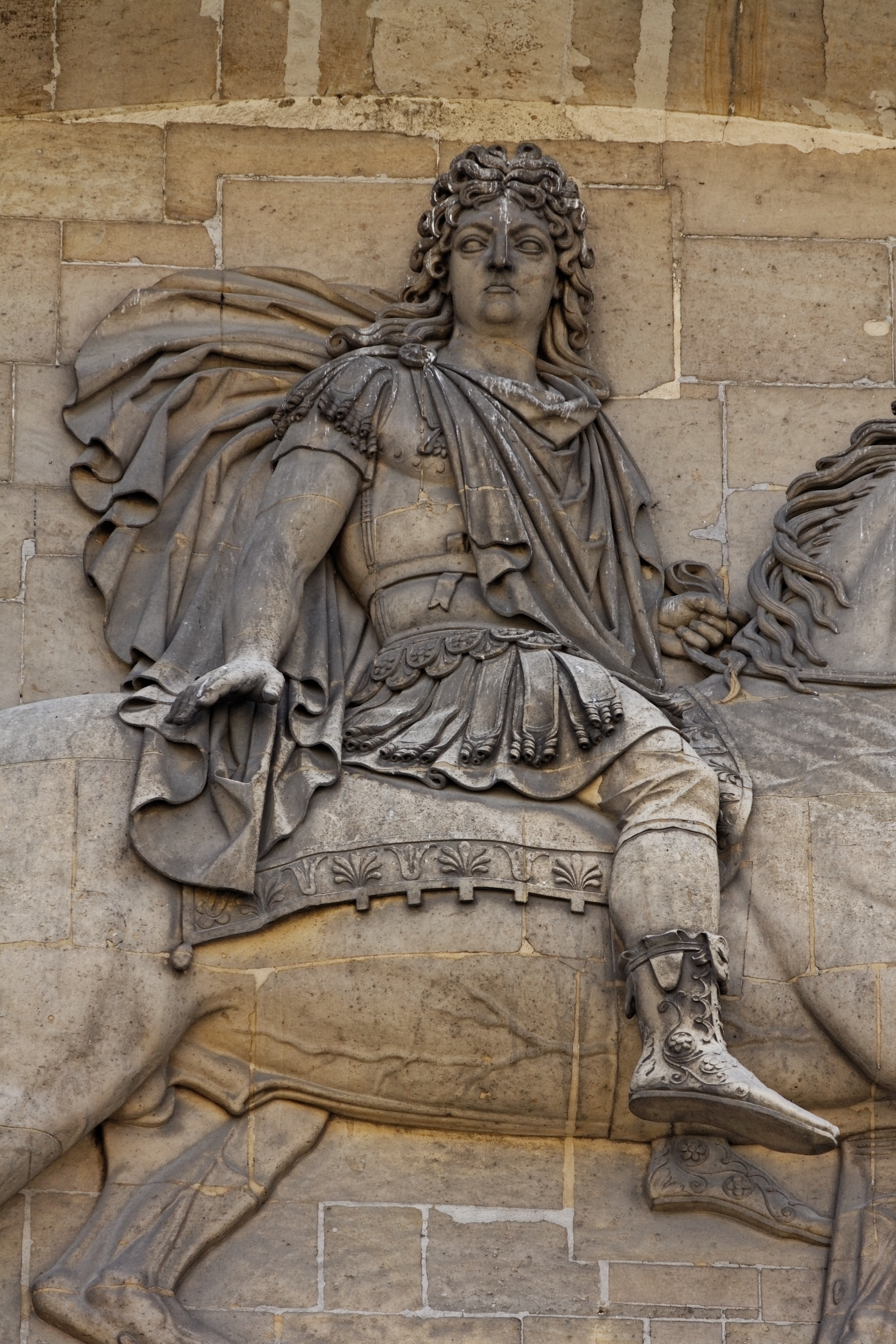 Détail de l'avant-corps de la façade nord de l'hôtel des Invalides à Paris. Bas-relief représentant Louis XIV à l'antique.